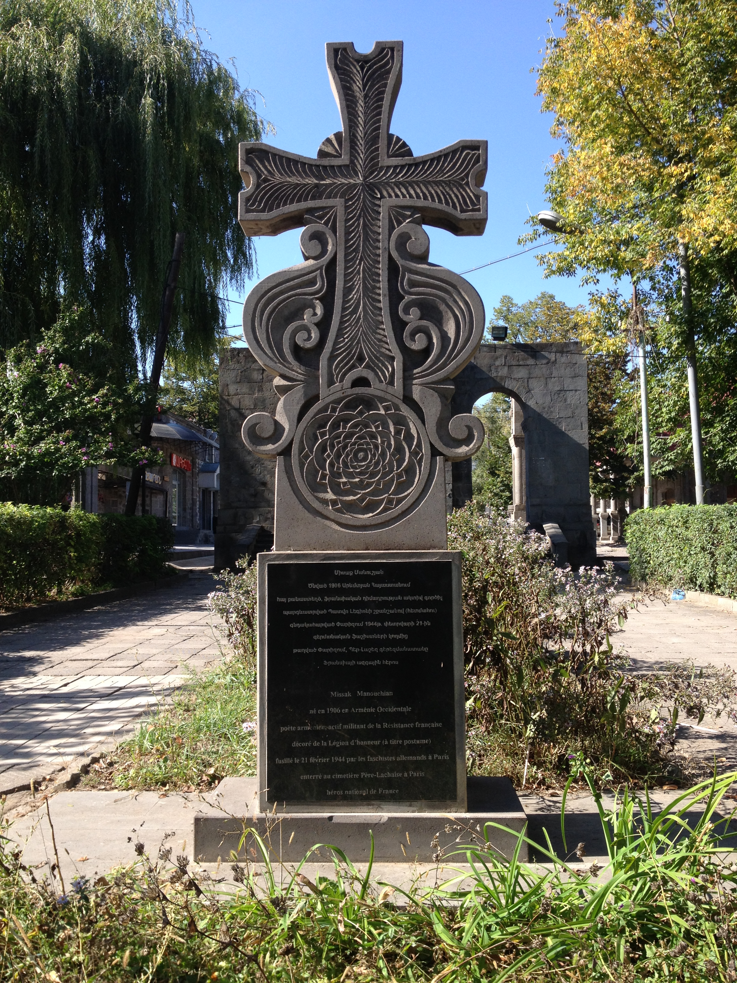 Միսաք Մանուշյանի անվան խաչքար Գորիսում